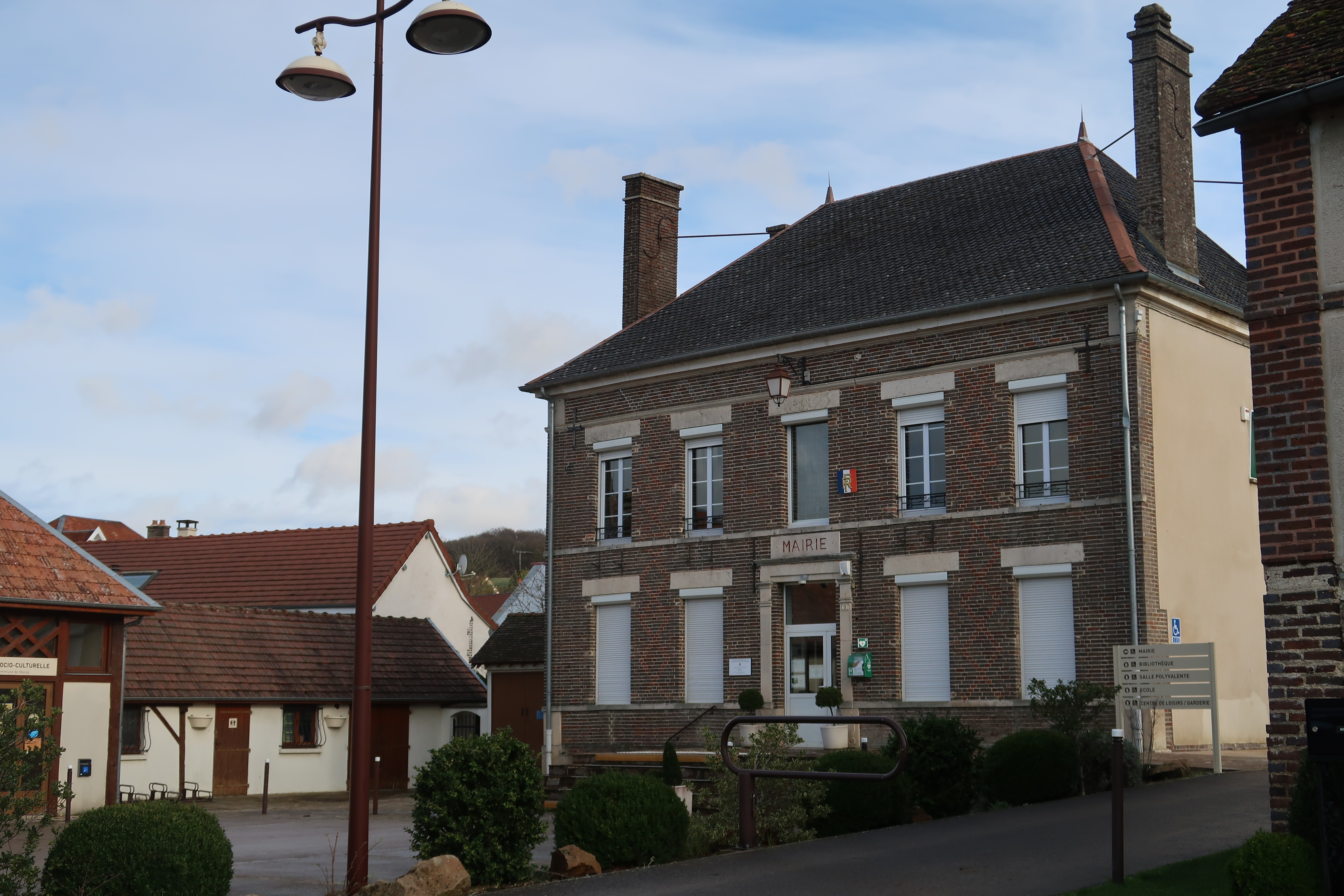 Macey, mairie